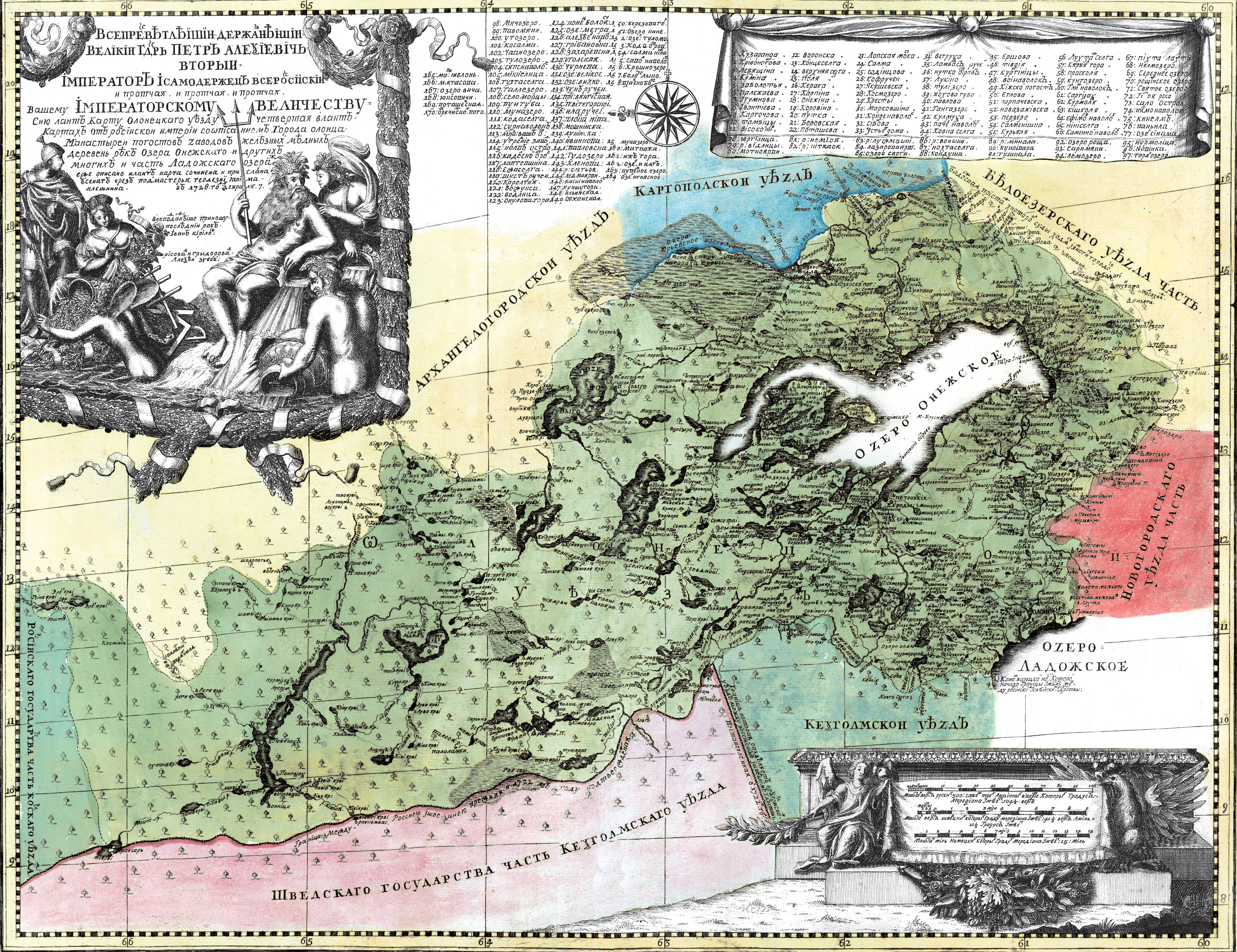 Олонецкий уезд из «Атласа Всероссийской империи» И. К. Кириллова. 1722-1737